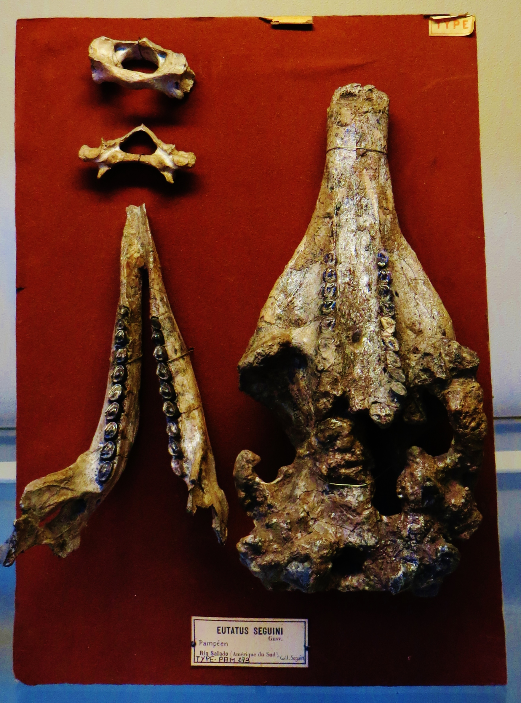 Fossil of Eutatus, an extinct mammal- Took the photo at Musee d'Histoire Naturelle, Paris